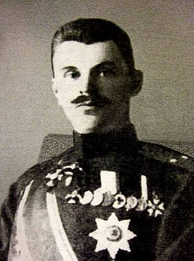 Деятель российского политического сыска Александр Иванович Спиридович (1873-1952)